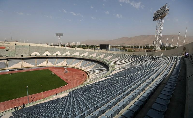 نصب صندلی‌های طبقه دوم ورزشگاه آزادی، ۲۳ تير ۱۳۹۵